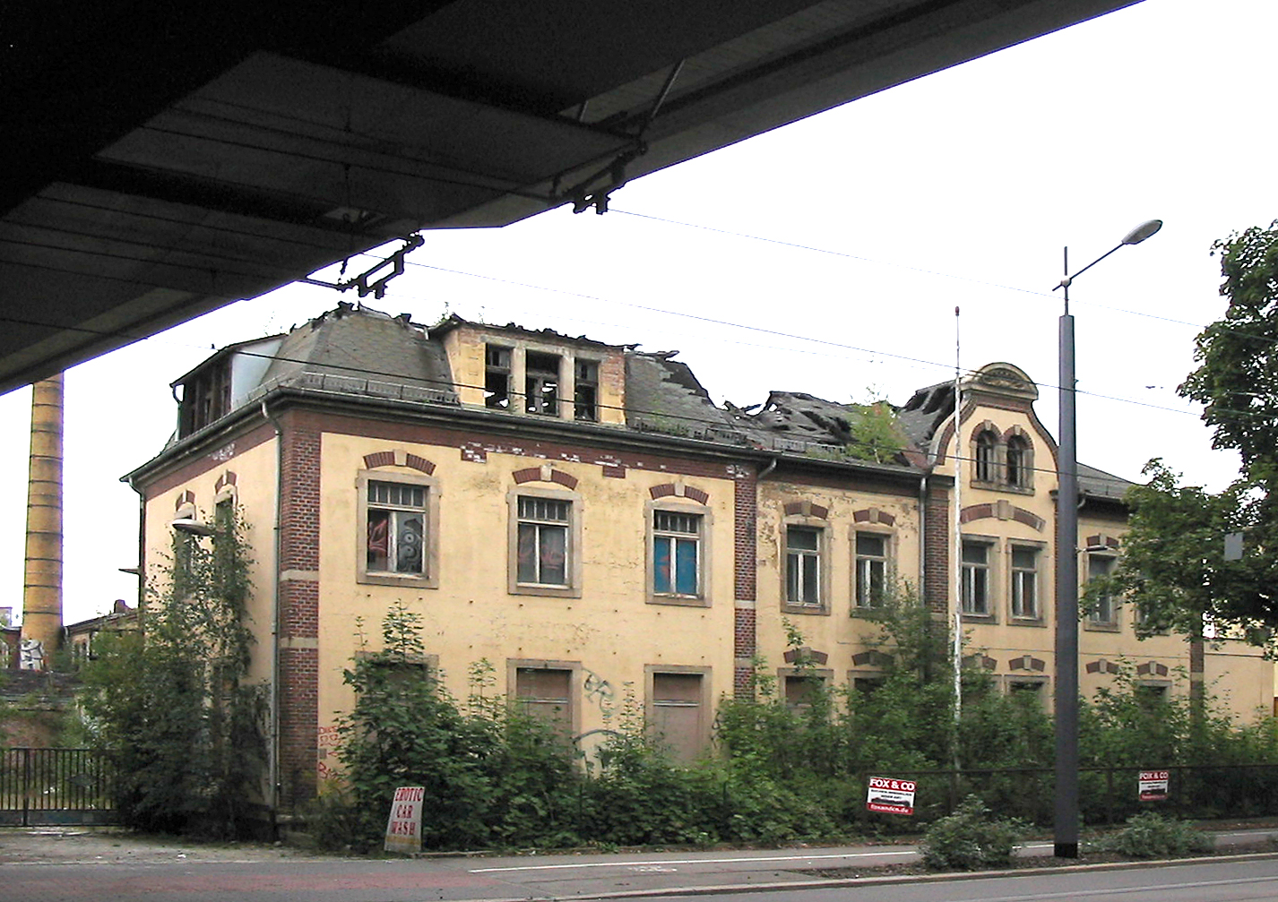 Firmengebäude von Koebig an der Meißner Straße, 2008 (links oben die Autobahn)